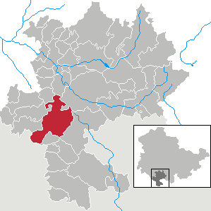 Gleichamberg in Thuringia - district Hildburghausen